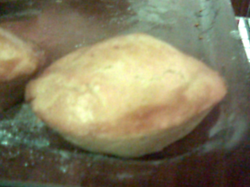 bocconotto preso con un cellulare presso un bar di gallipoli